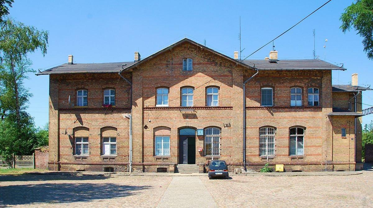 Budynek dworca w Babimoście - tu zaczyna się bieg ulicy Dworcowej.